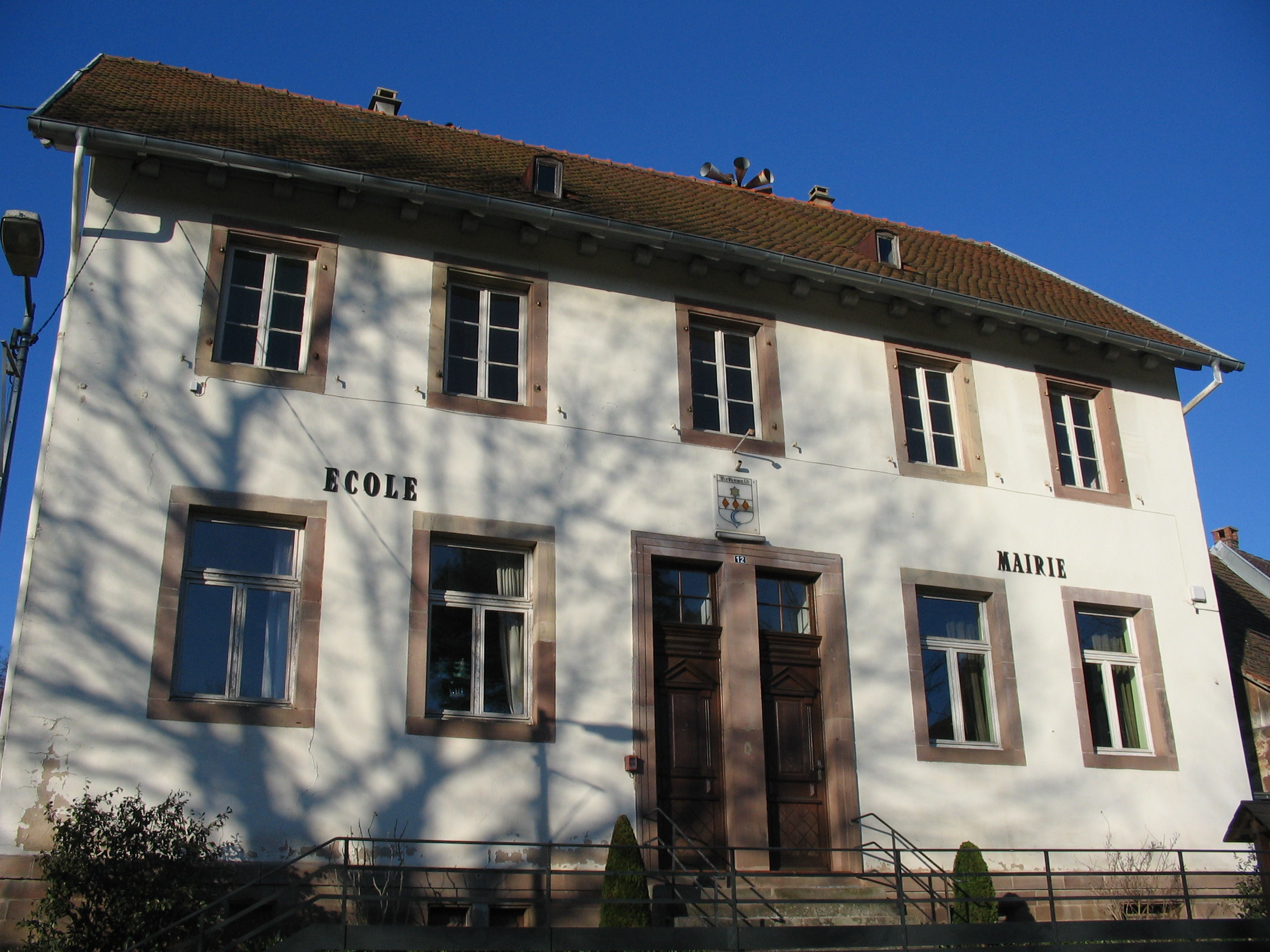 Mairie-école de Birkenwald (Bas-Rhin)